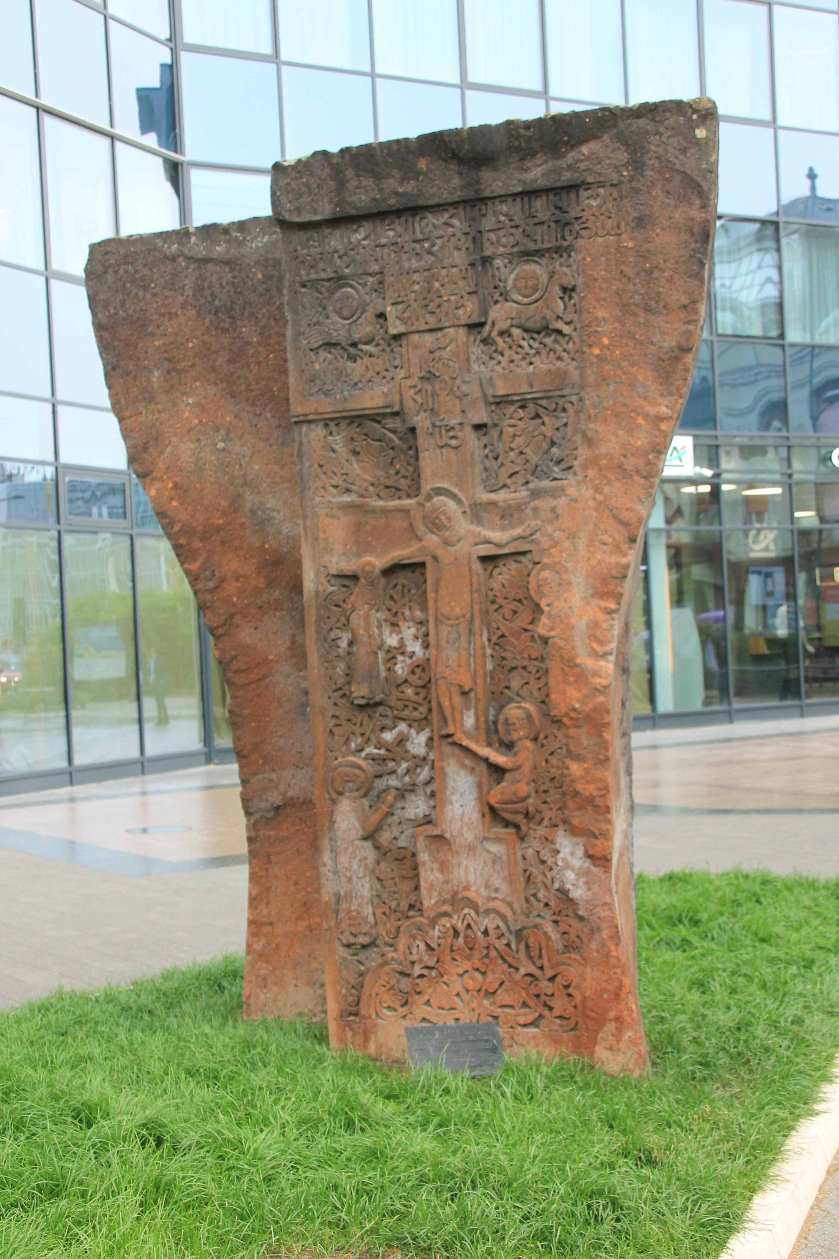 Nadgrobni spomenik porodice Čanadi